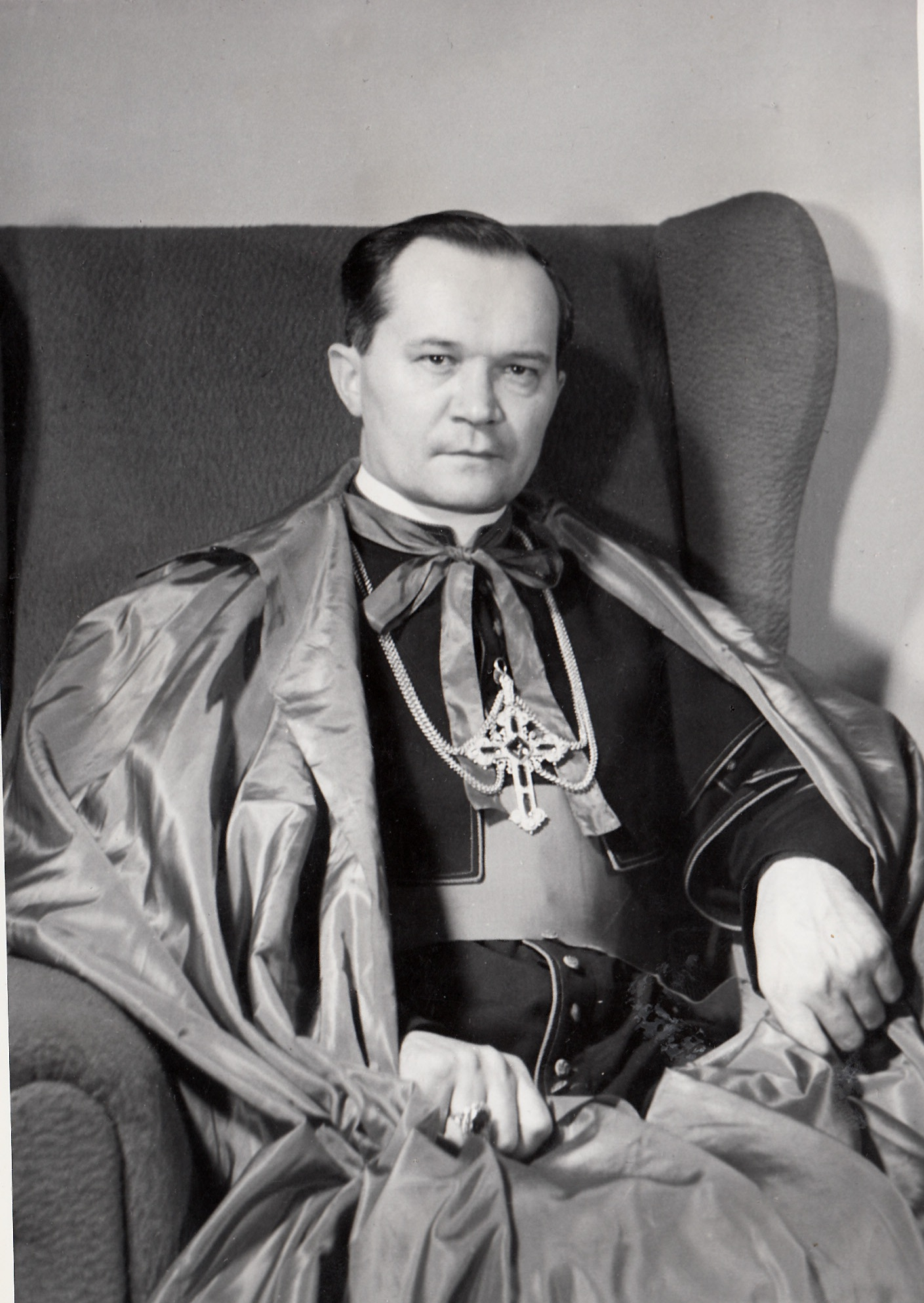 Biskup Josef Hlouch